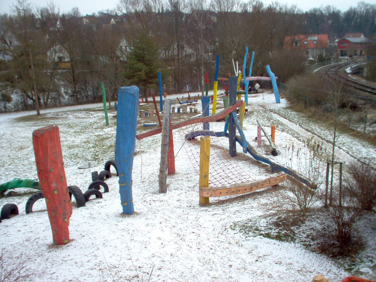 Abenteuerspielplatz Sigmaringendorf, Adventure Playground